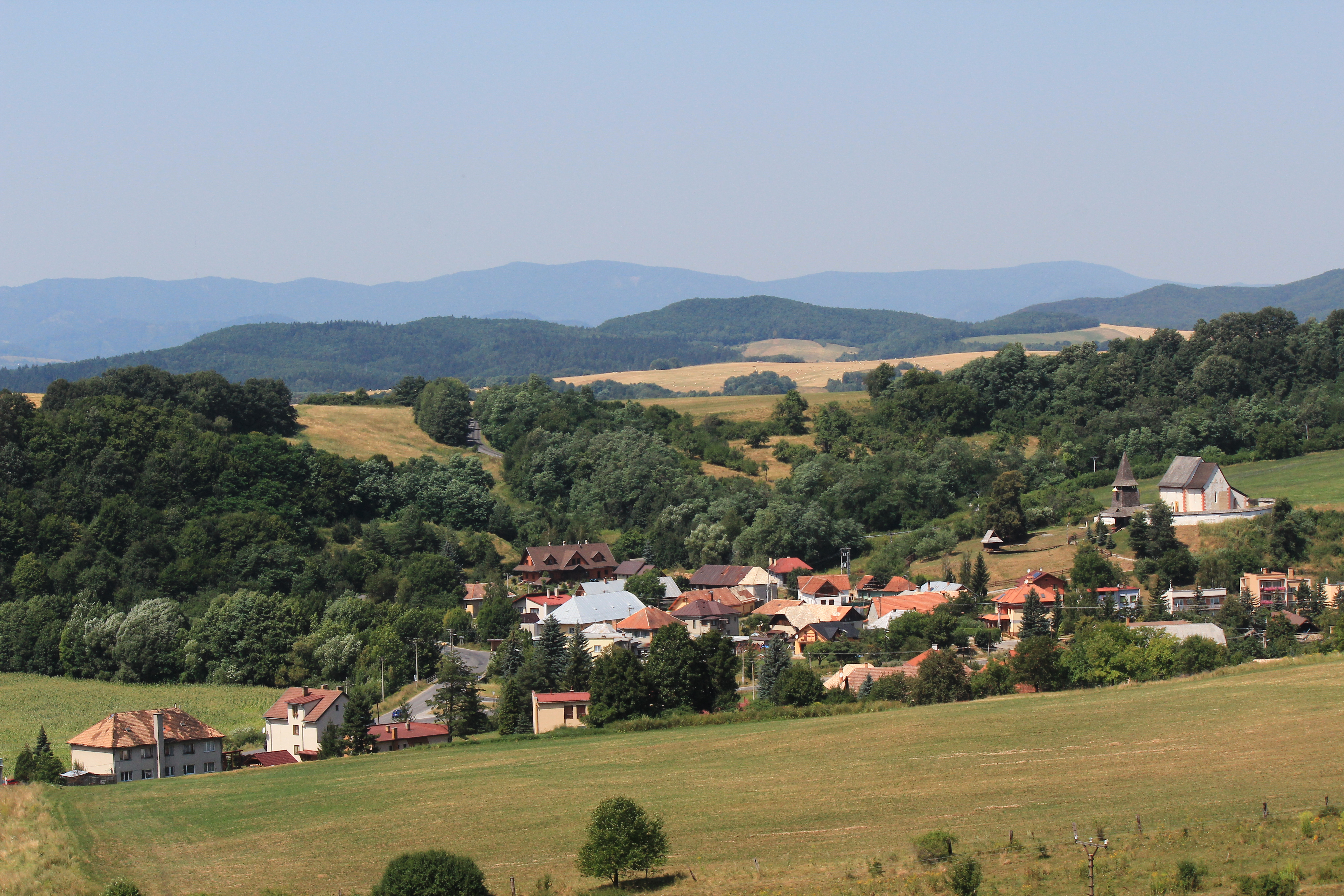 Celkový pohľad na obec Čerín s gotickým kostolom sv. Martina